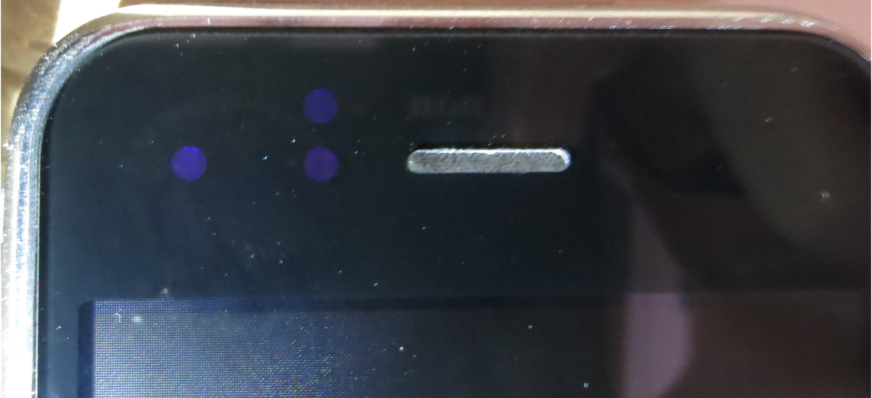 IPhone Helligkeits und Annäherungssensoren